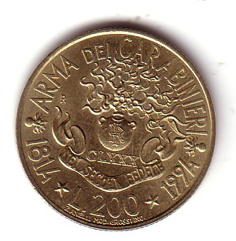 Moneta da 200 lire commemorativa del centenario dei carabinieri (1994)